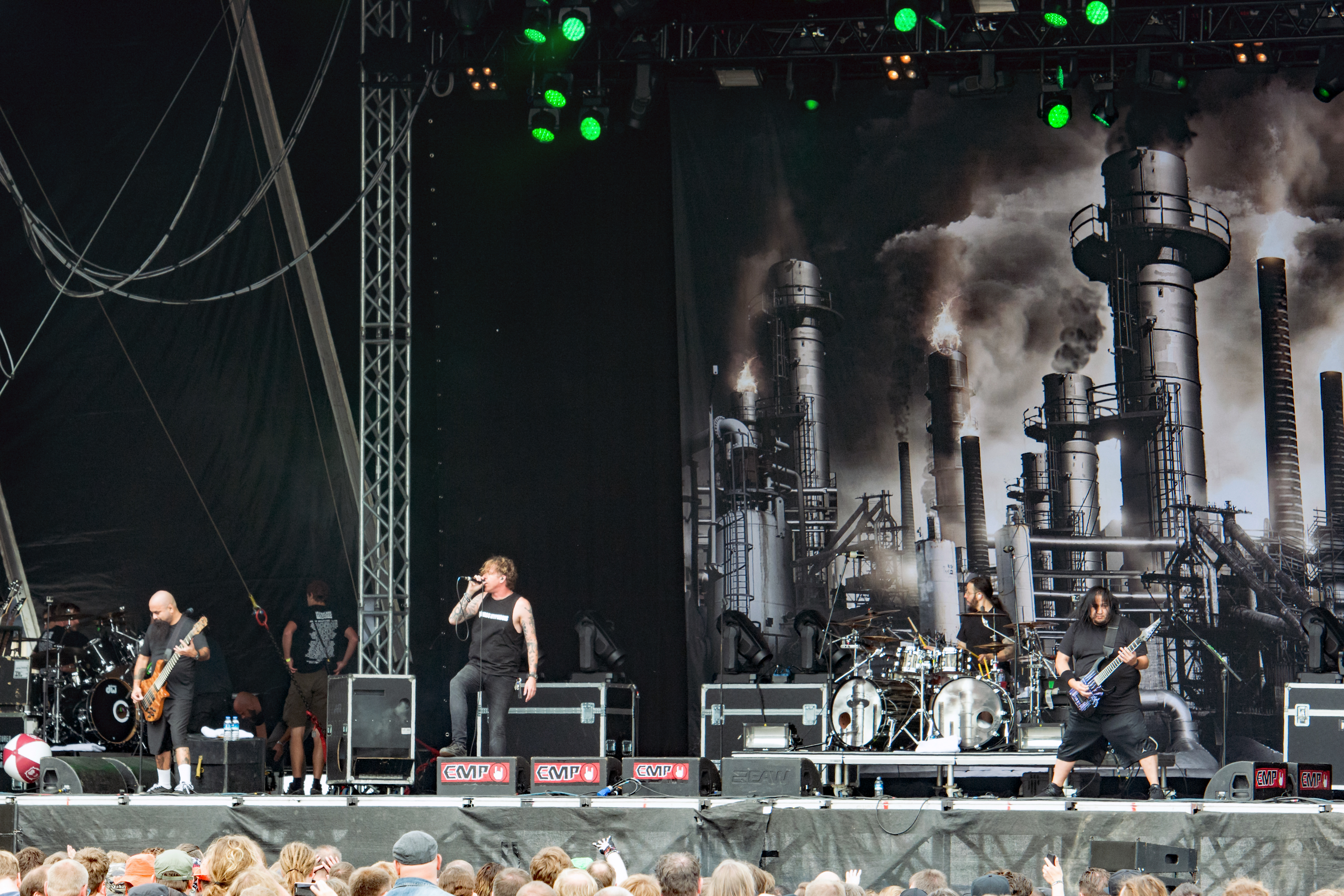 Fear Factory auf dem Elbriot 2016